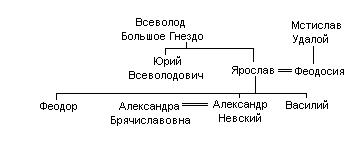 == Лицензирование == Категория:Александр Невский